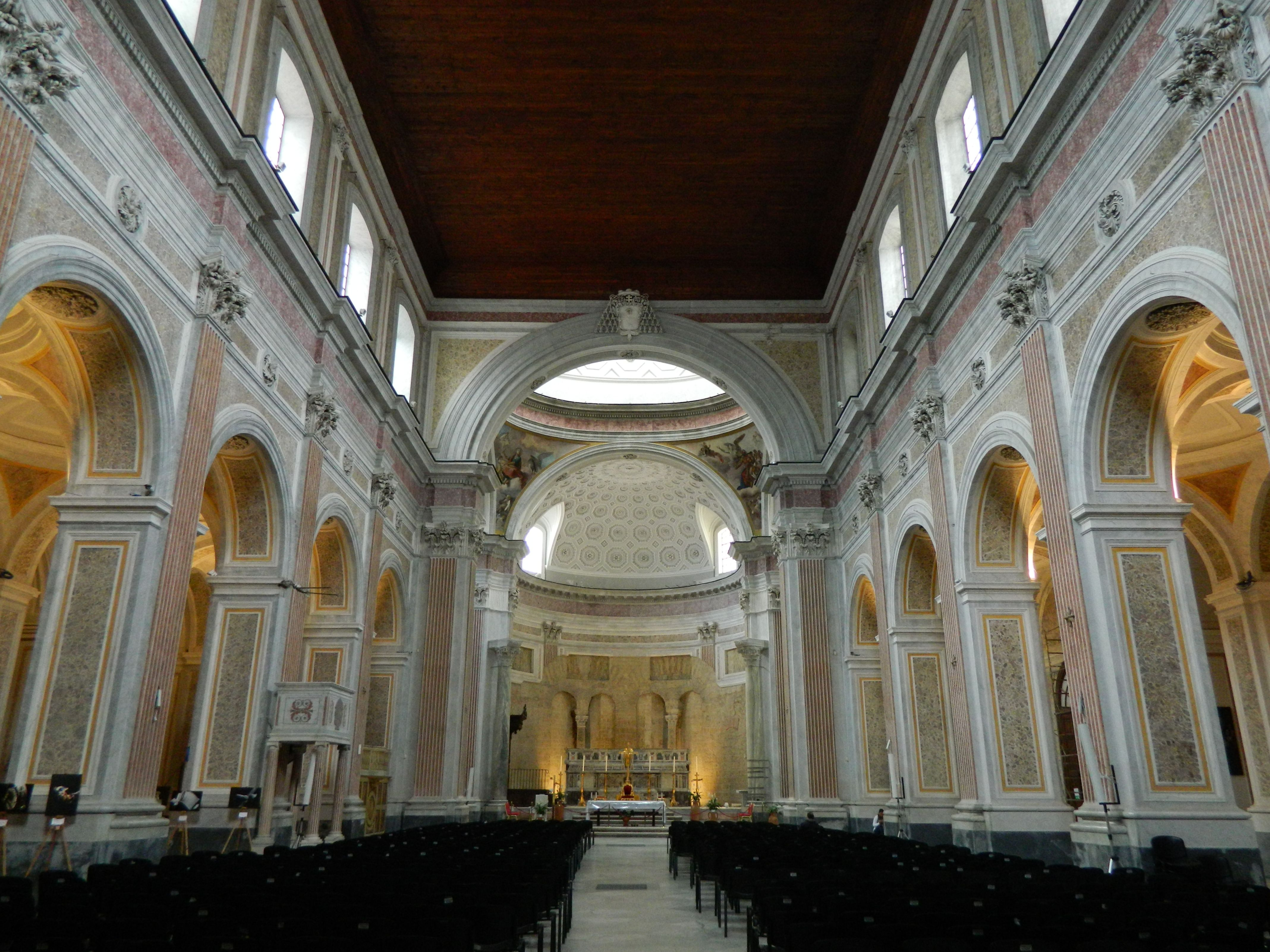 Chiesa di San Giovanni Maggiore di Napoli - La navata centrale